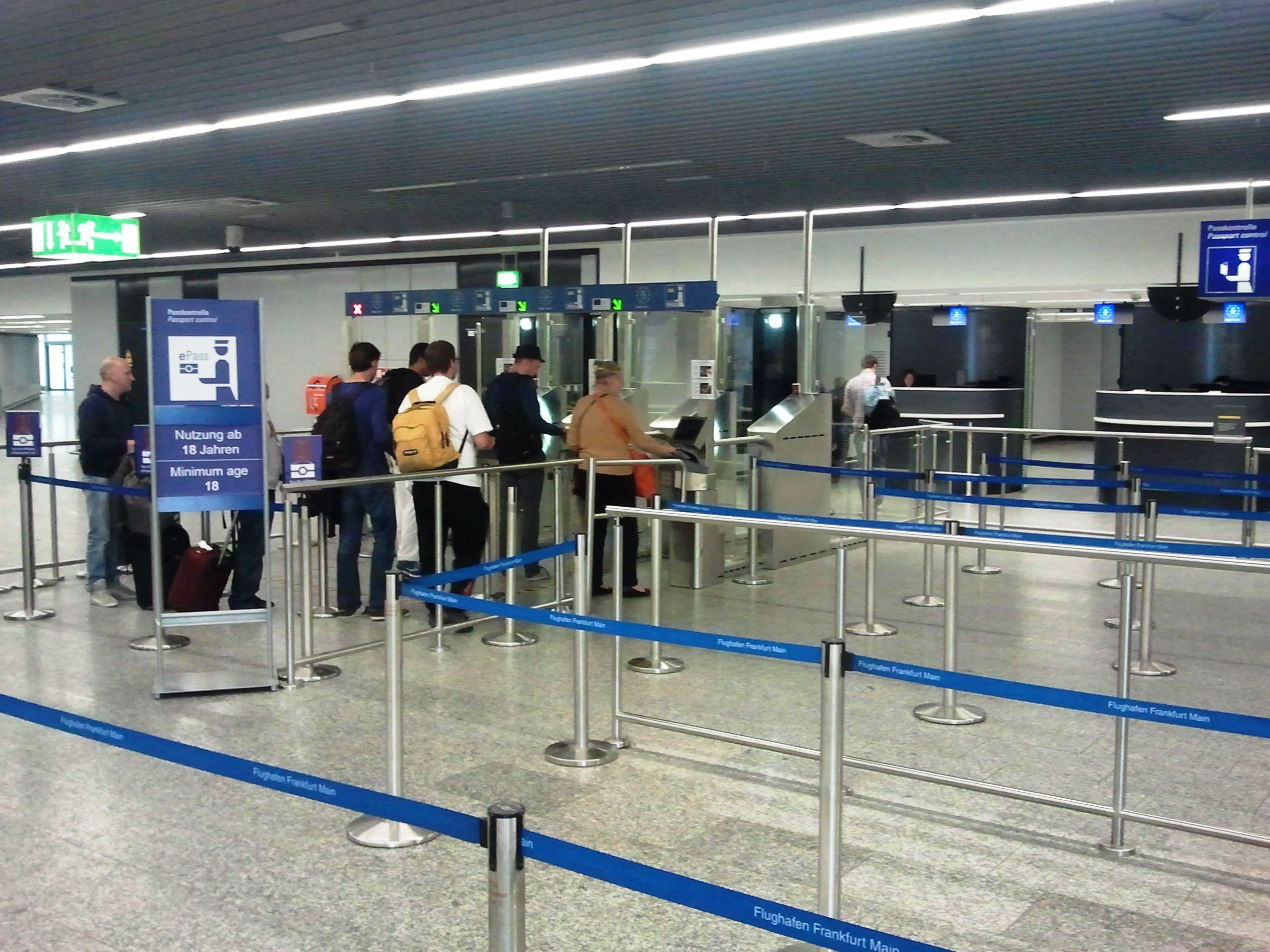 Das Foto zeit den Grenzkontrollbereich des aktuell installierten EasyPASS-Systems